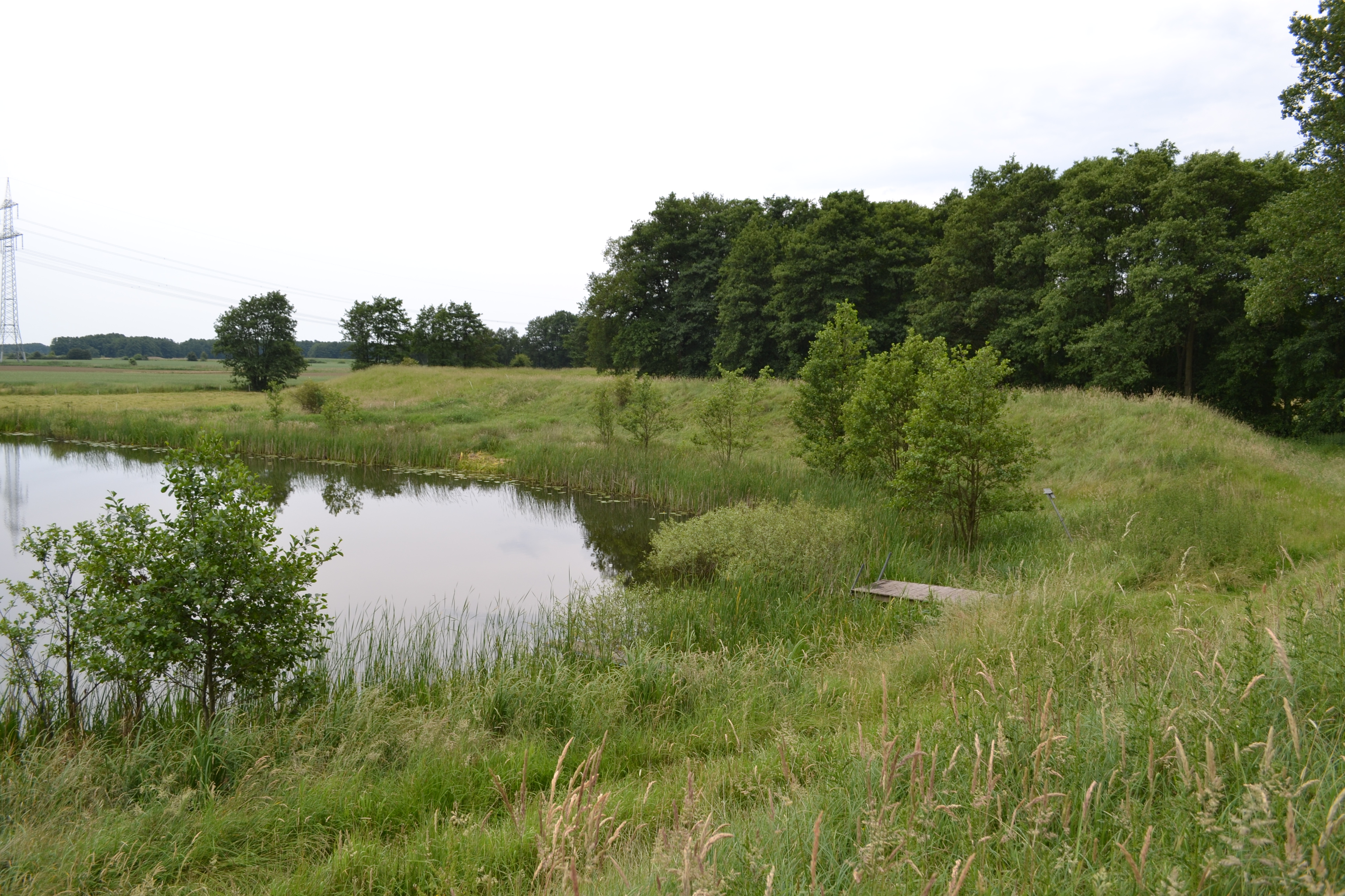 Historischer Ilaudeich/Stilkensdeich mit Brack